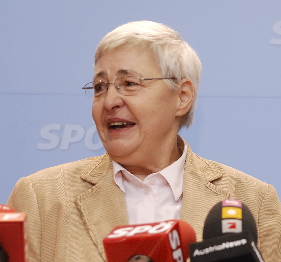 SPÖ-Vorsitzender, Spitzenkandidat Werner Faymann, die ehemaligen SPÖ-Frauenministerinnen Johanna Dohnal, Helga Konrad, Nationalratspräsidentin Barbara Prammer, SPÖ-Bundesgeschäftsführerin Doris Bures sowie die amtierende Frauenministerin Heidrun Silhavy nehmen in einer gemeinsamen Pressekonferenz zum Thema "Konzepte für eine moderne Frauenpolitik" teil. Wien, 22.09.2008© Thomas Jantzen/SPÖ